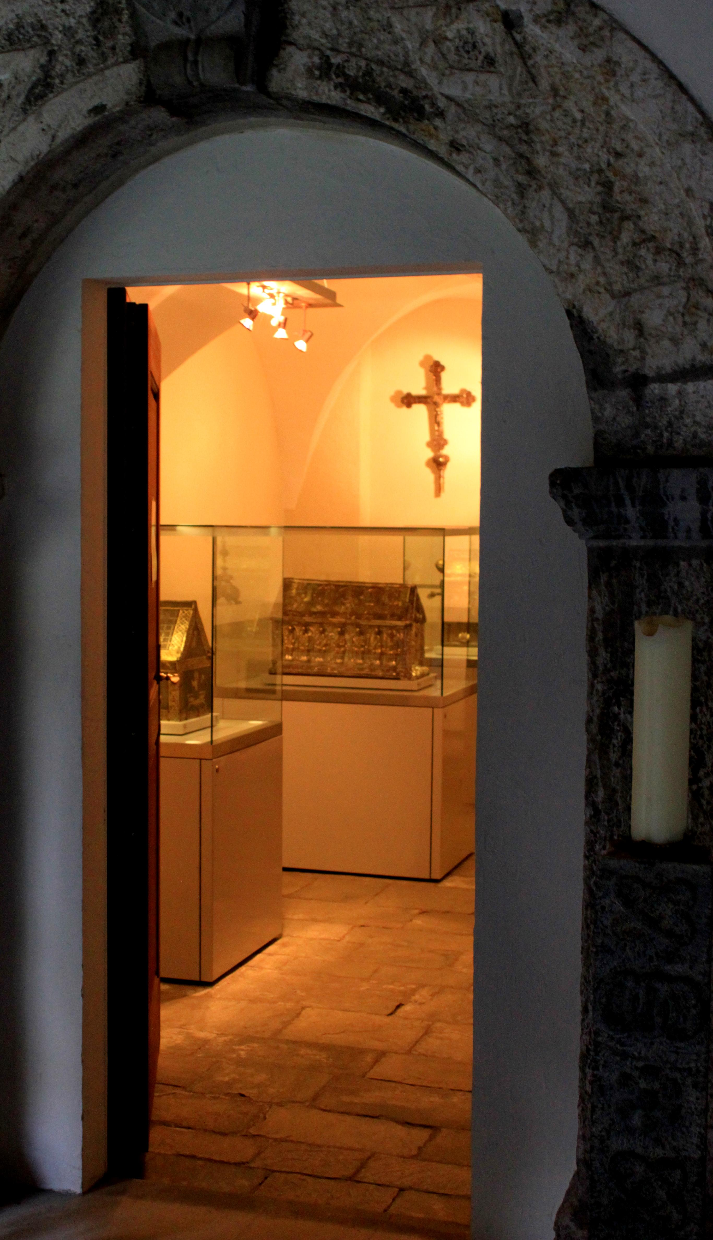 Suisse, canton du Valais, Saint-Maurice, Abbaye, trésor